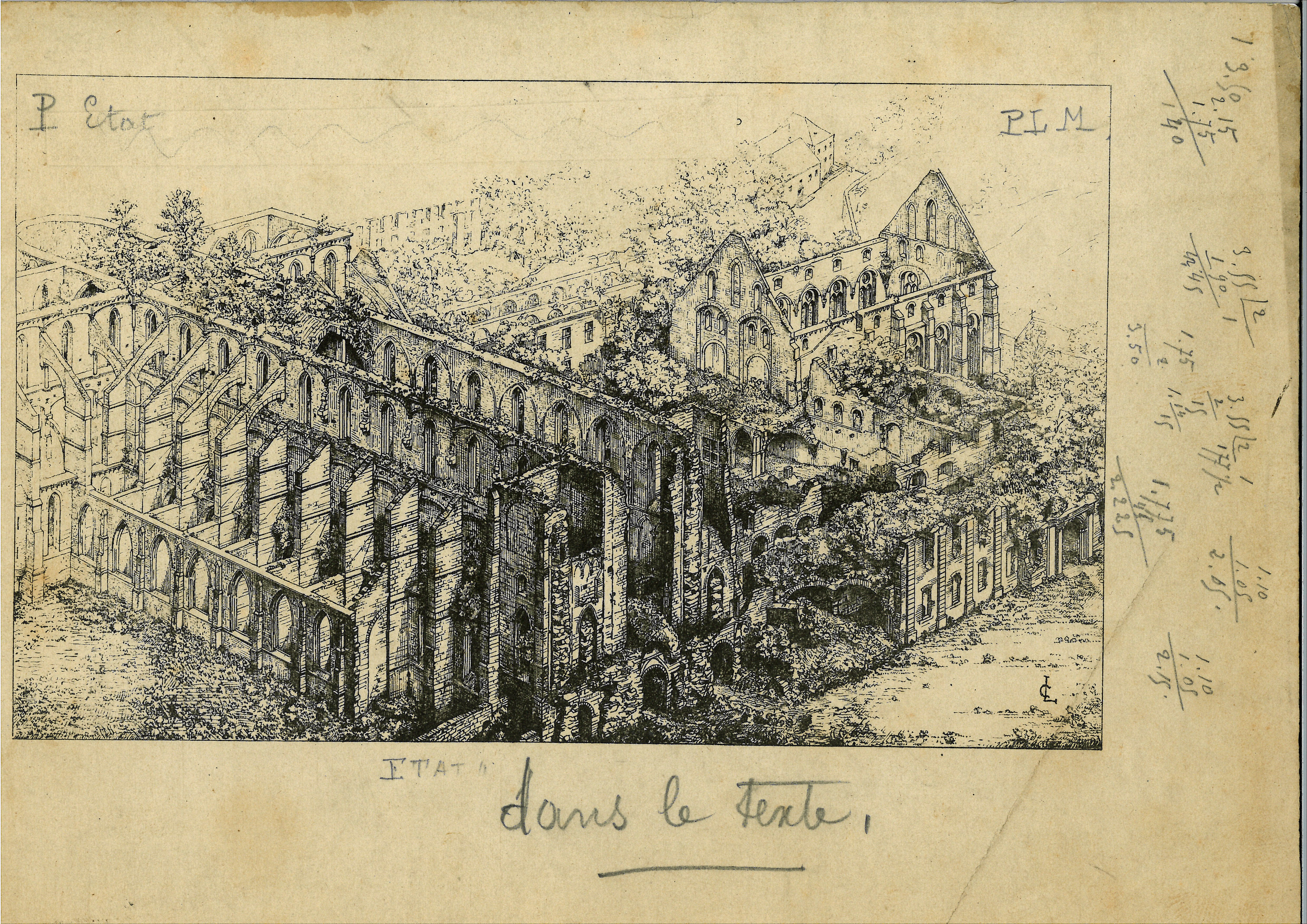 Dessin à la plume représentant les ruines de l'abbatiale de l'Abbaye de Villers, réalisé par l'architecte Charles Licot au XIXe siècle